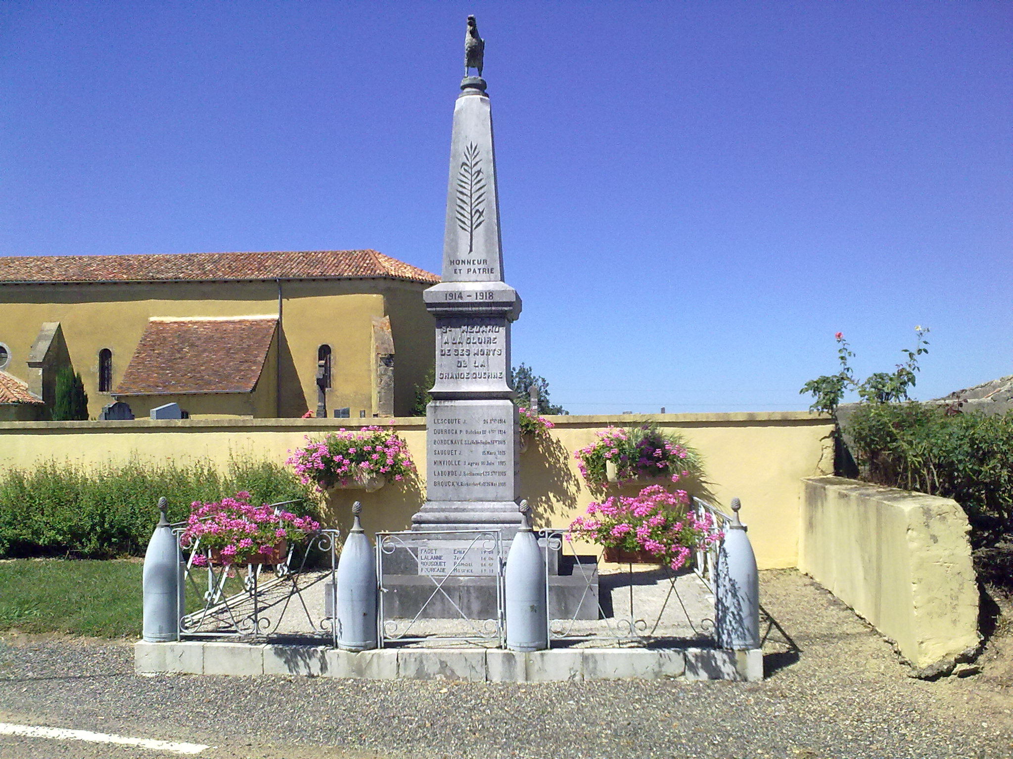 Saint-Médard (Pyrénées-Atlantiques) le 18 juillet 2010, France.